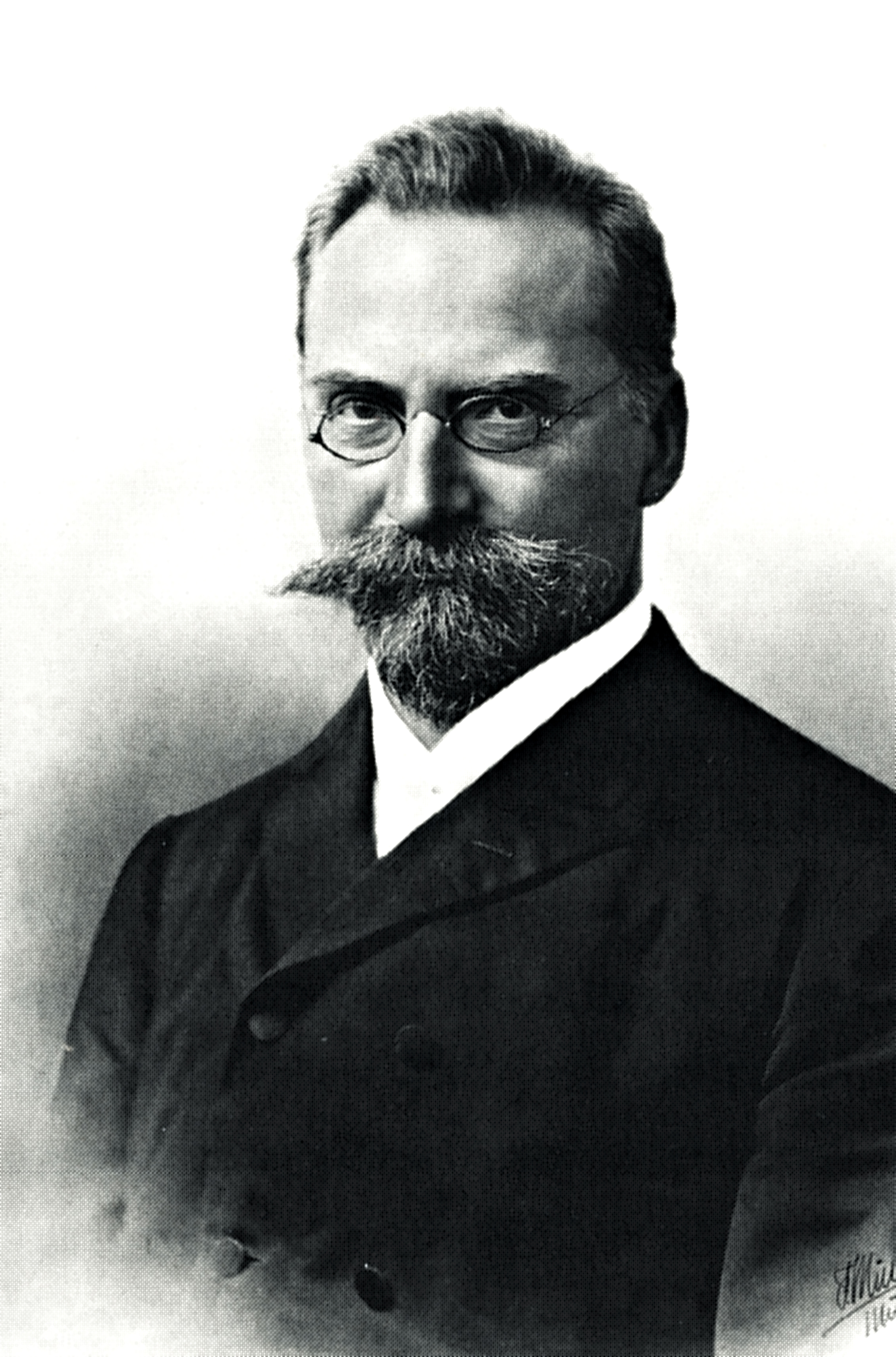 Porträtfotografie des bayerischen Verwaltungsjuristen Philipp Brunner (1844–1919)